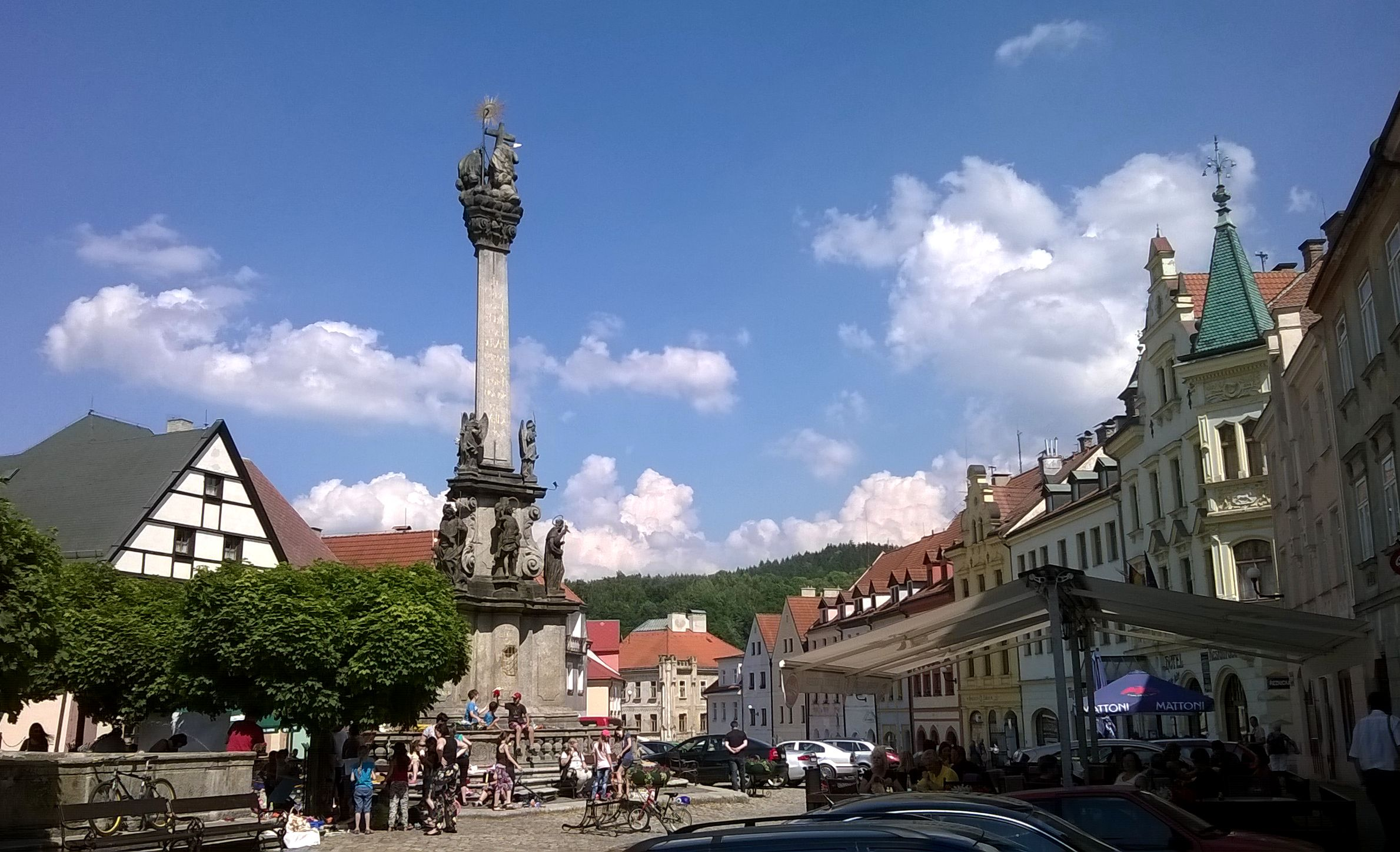 náměstí